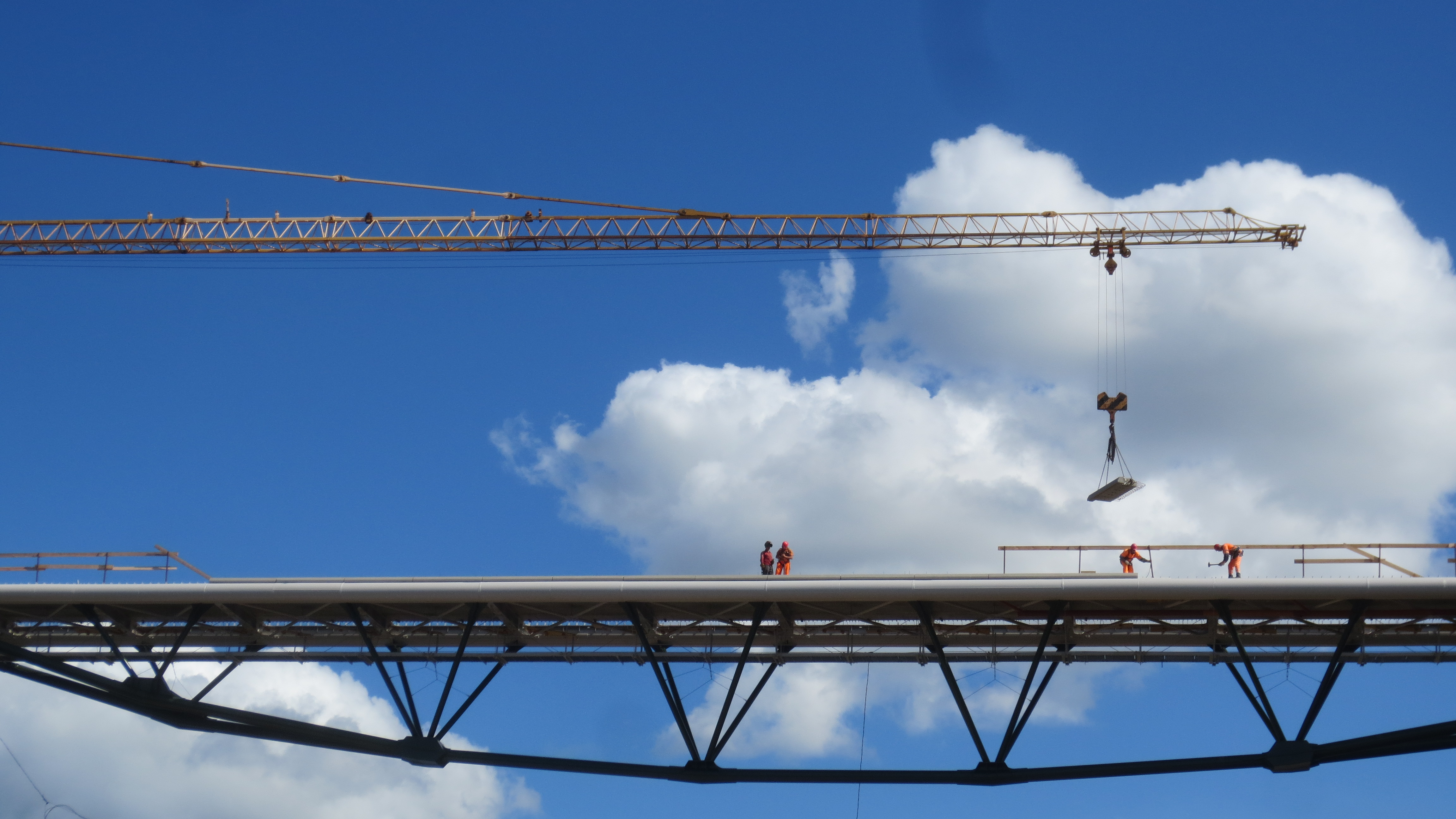 Perdangos turėklinių bortų montavimas